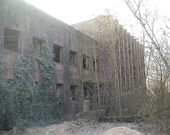 Das Verwaltungsgebäude des stillgelegten Kohlenbergwerks Minden bei Minden in Nordrhein-Westfalen. Das Gebäude gehörte zur Schachtanlage Notthorn. Rechts ist die Waschkaue.